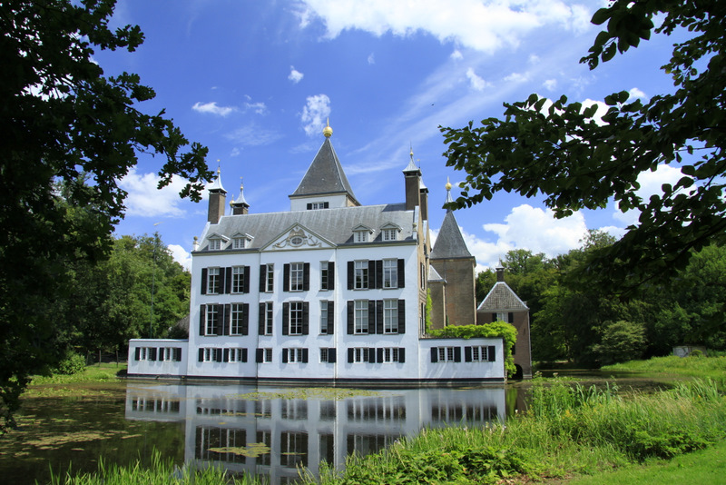 De Achterkant van Kasteel Renswoude spiegeld zich in de kasteel vijver.